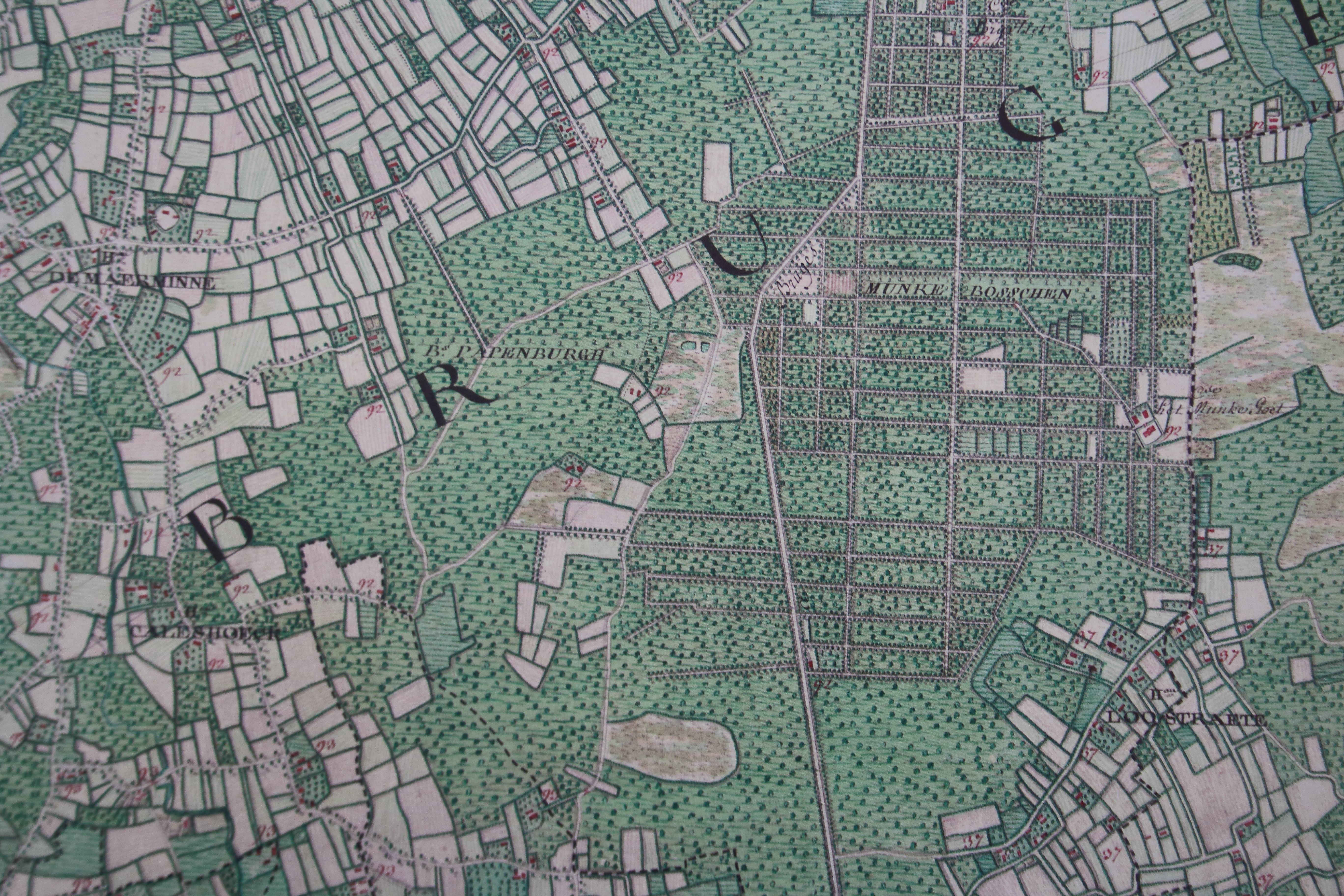 Munkebossen Ferrariskaart